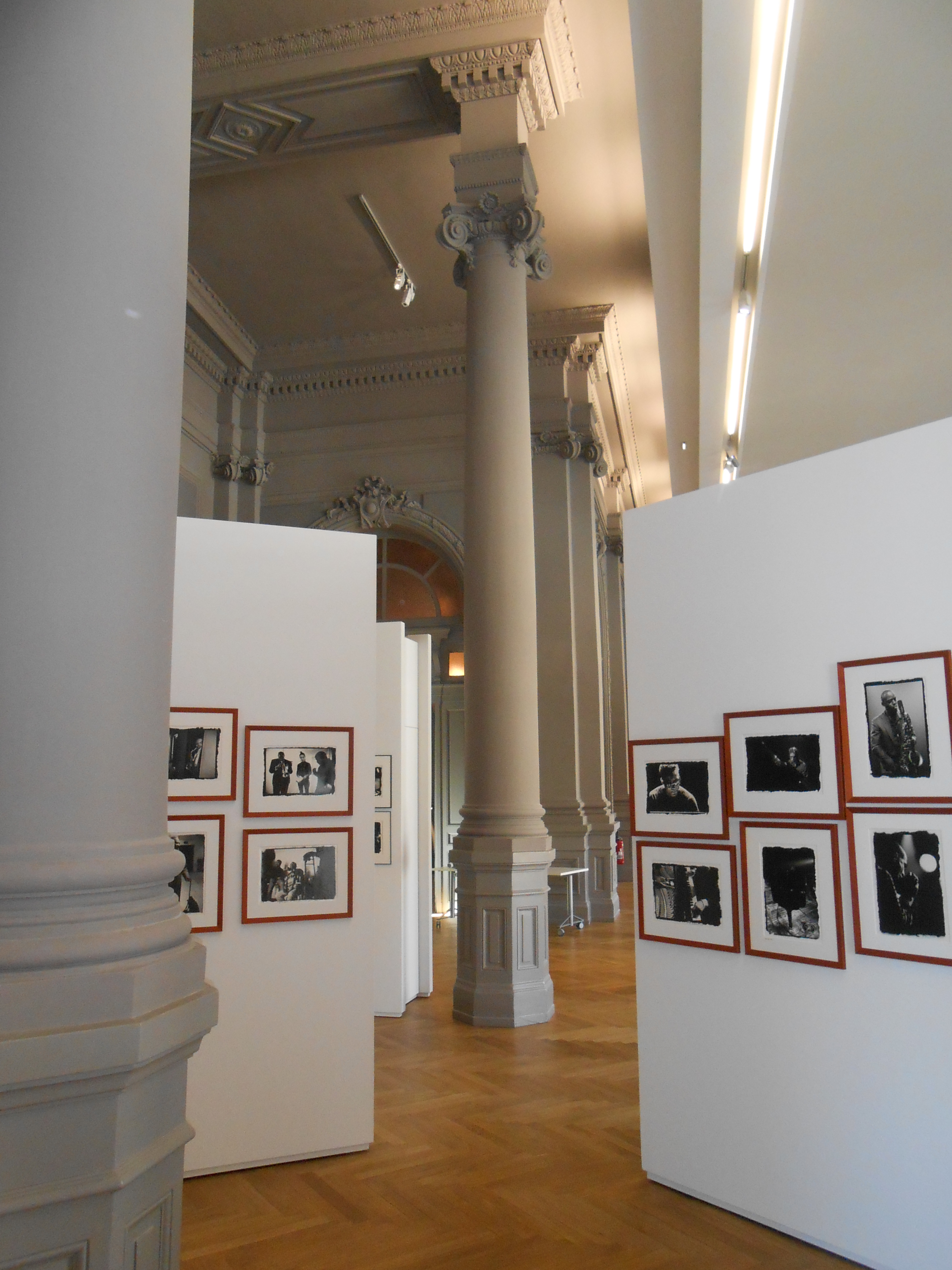 Salle Gilbert Gaillard, Clermont-Ferrand, Auvergne. Exposition de l'oeuvre photographique de Michel Vasset au sein du cadre du 30ème festival international Jazz en tête. (Octobre 2017).